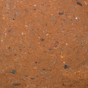 Tuff.